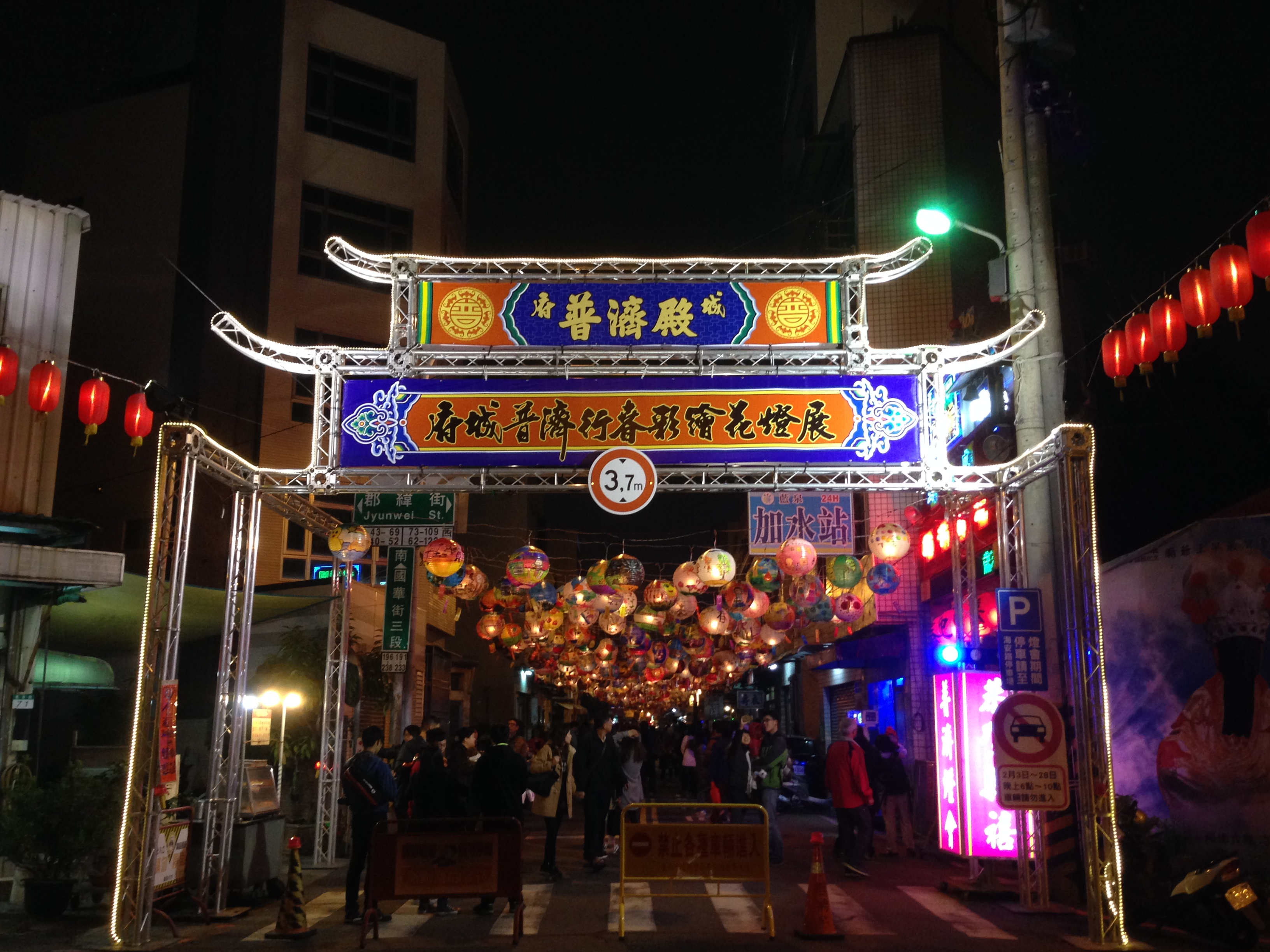 中文（台灣）: 普濟殿元宵花燈